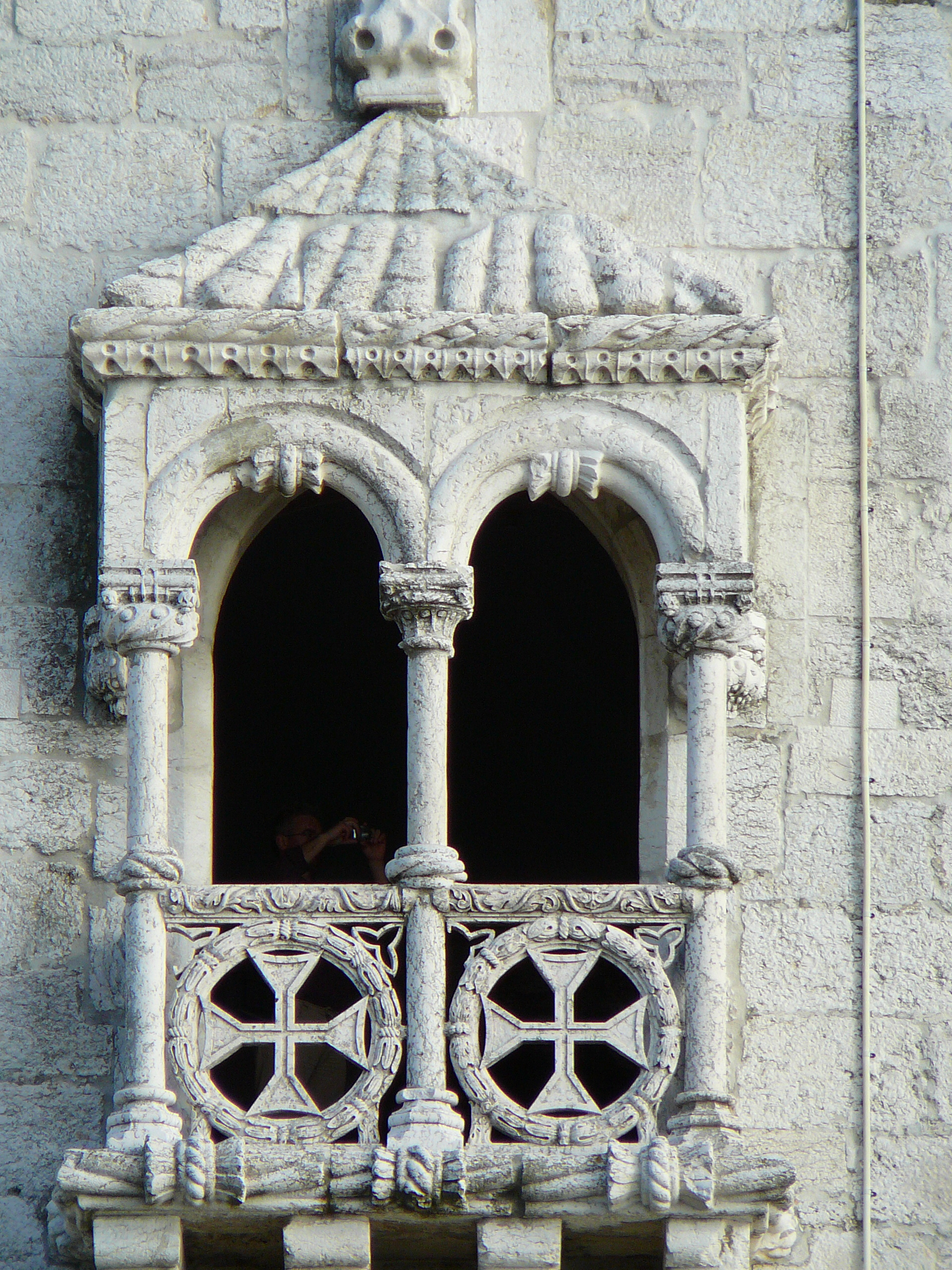 Lisboa - Torre de Belém